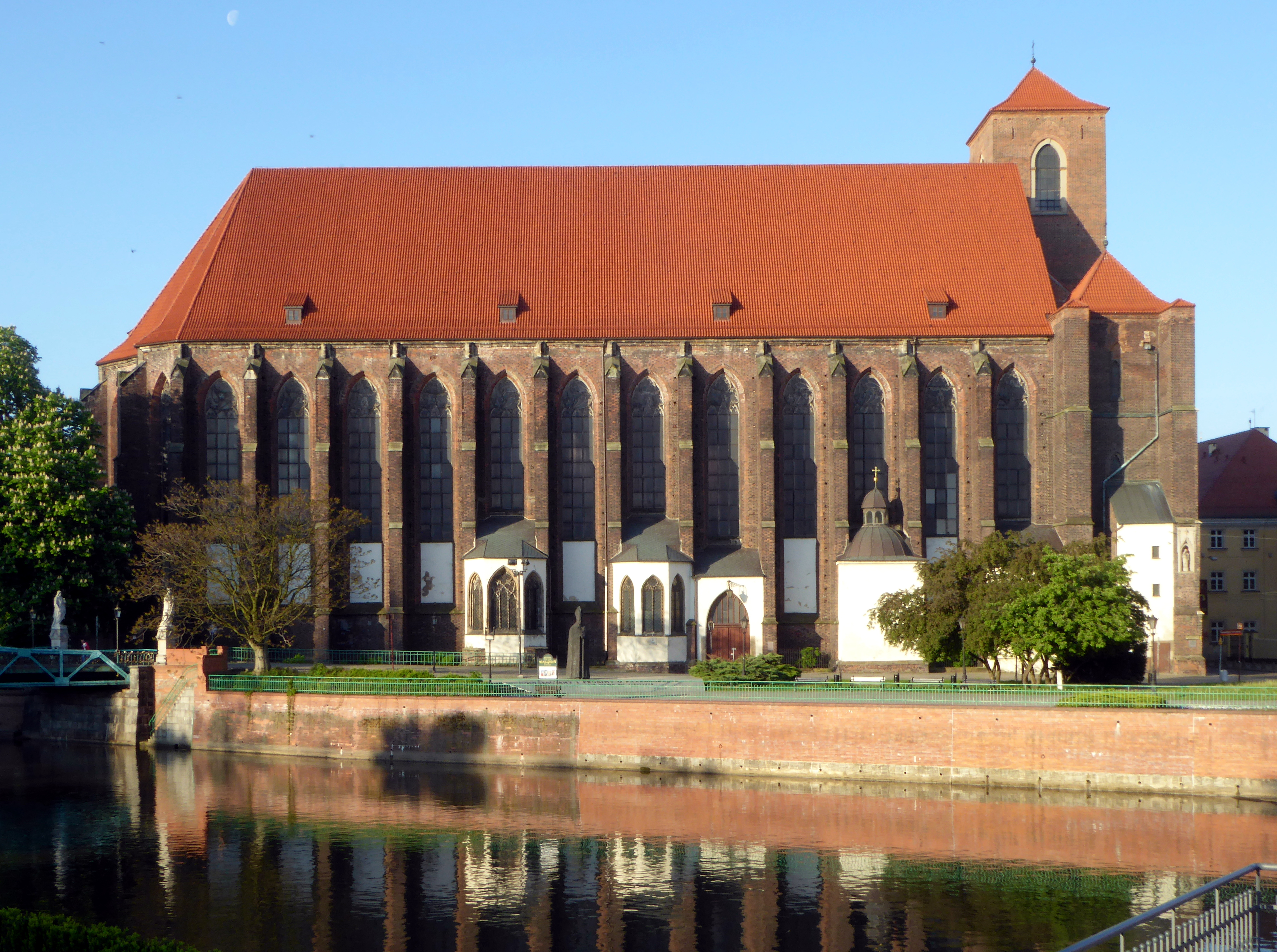 Breslau, Sandkirche St. Maria, von Norden gesehen.